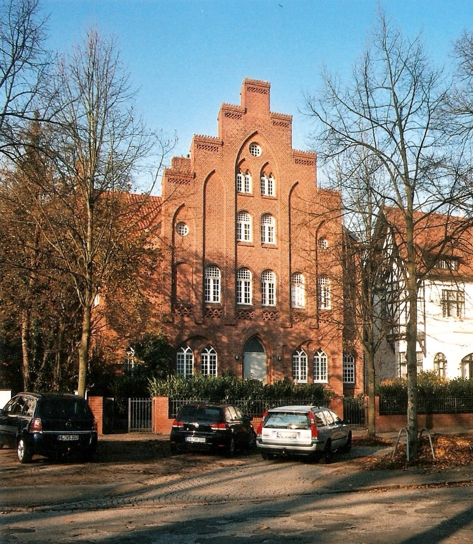 Der einstige Wohnsitz von Otto-Heinrich Drechsler mit noch immer bestehender Auffahrt